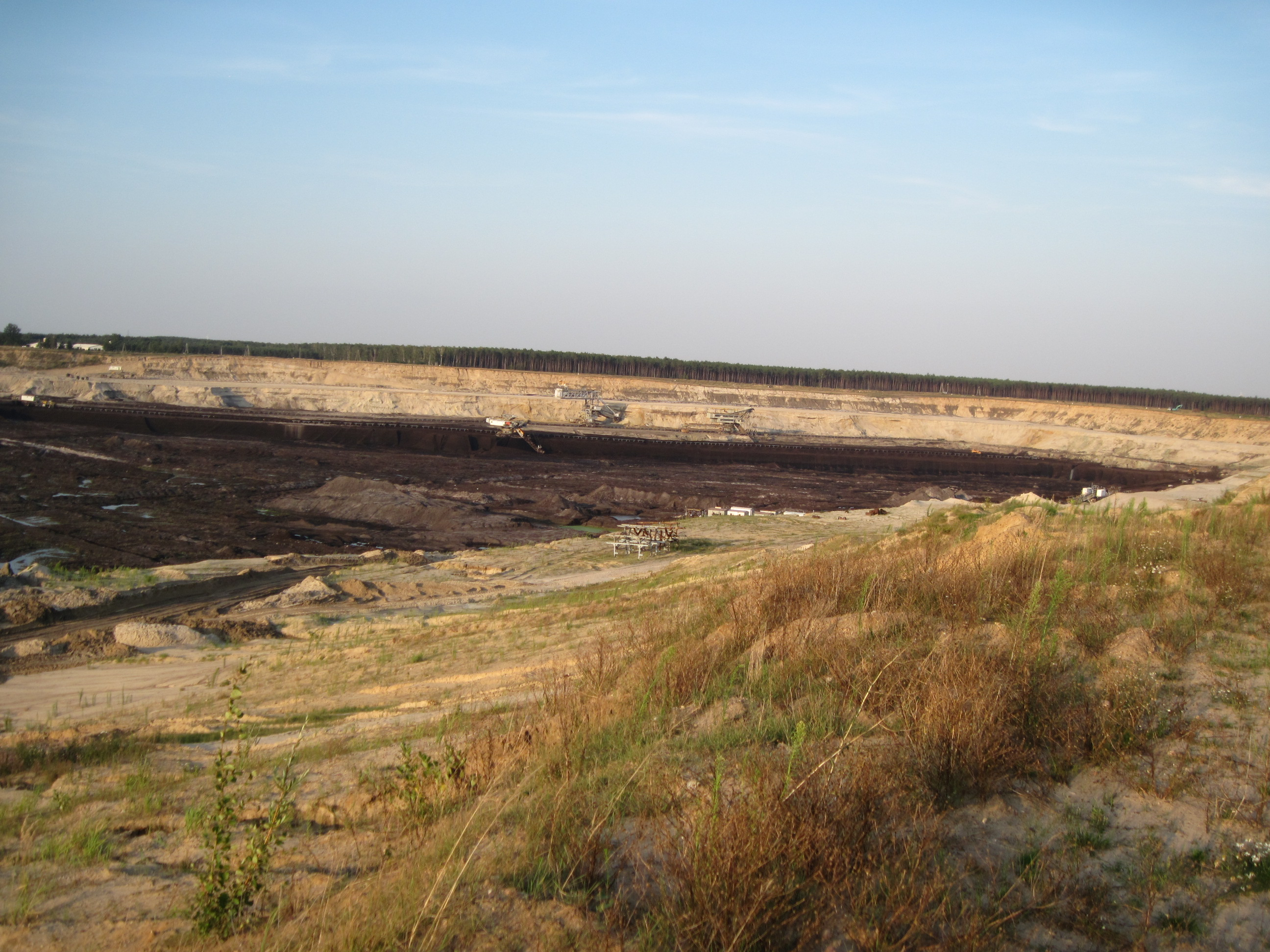 Odkrywka Drzewce 2018 r.. Widok od zachodu